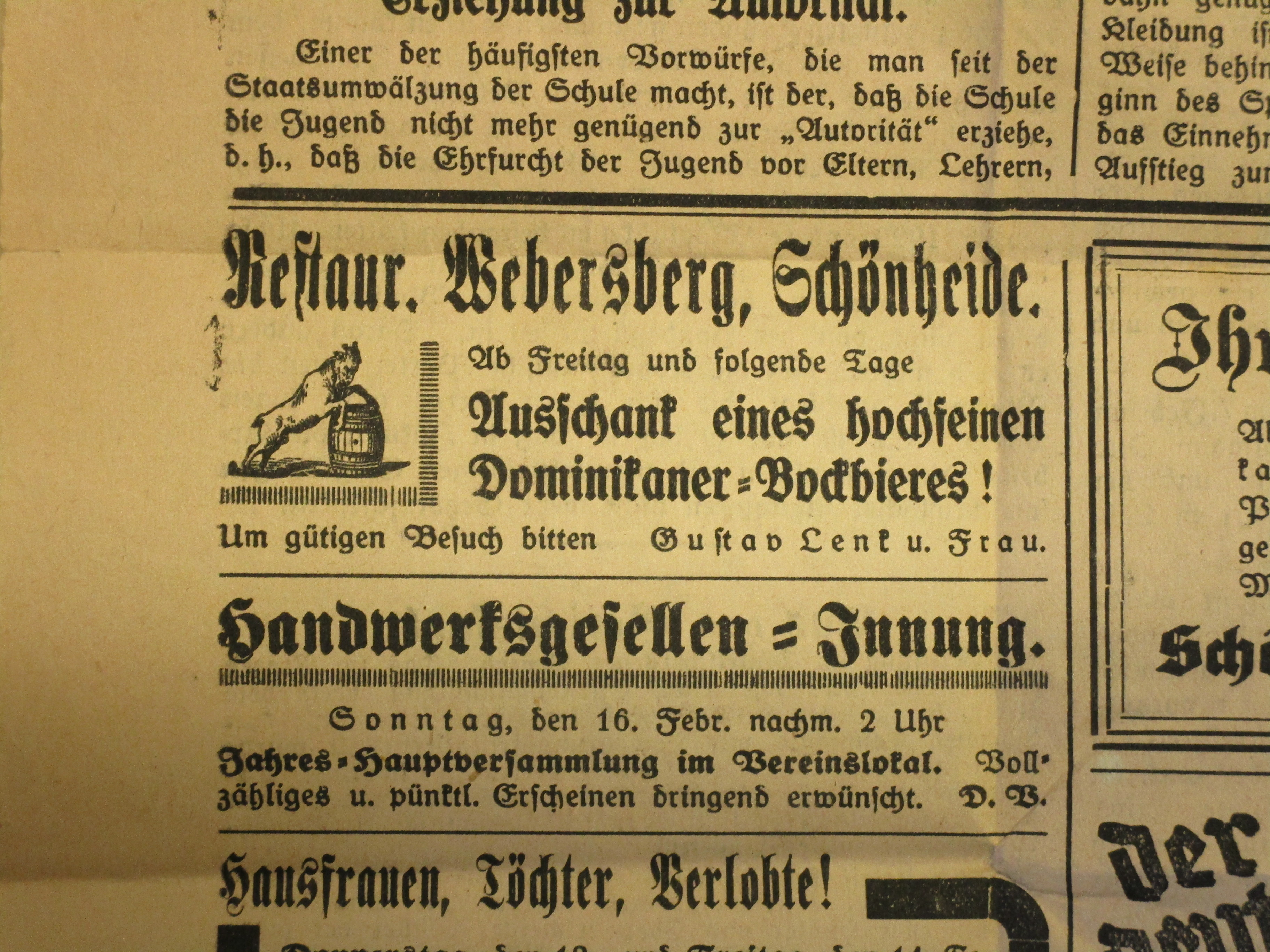 Webersberg, Ortsteil von Schönheide im Erzgebirge: In einer Anzeige im Schönheider Wochenblatt am 8. Februar 1930 laden Gustav Lenk und seine Frau zum Genuss von Bockbier in ihre Restauration Webersberg ein.